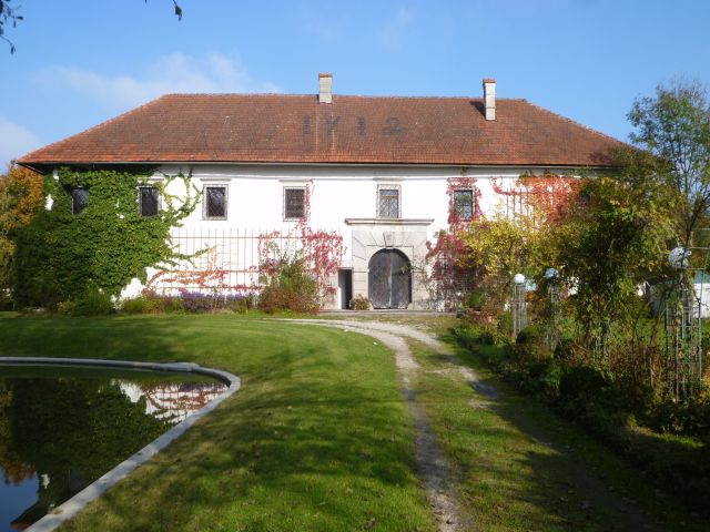 Schloss Haiding - Frontansicht mit Teich